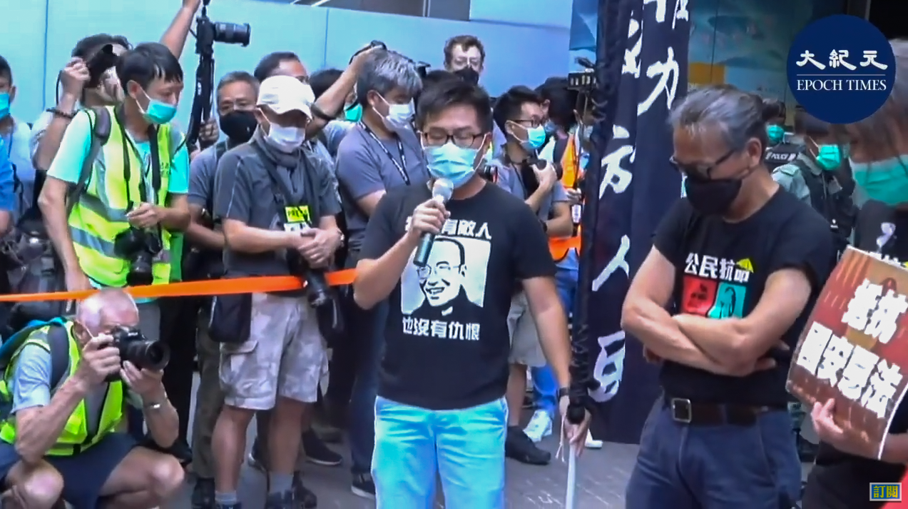 社民連遊行期間，警察搜查遊行人士隨身背包後才獲得放行